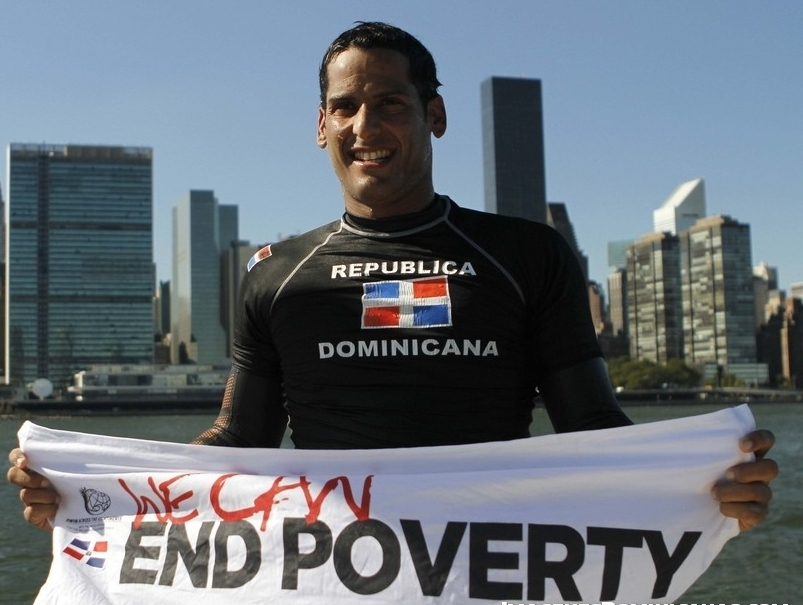 Marcos Díaz, nadador dominicano por Reynaldo Brito de .